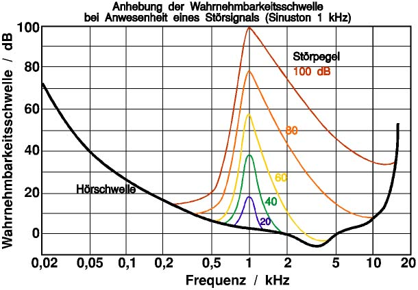 Wahrnehmbarkeit von Schallsignalen bei Anwesenheit von Störsignalen